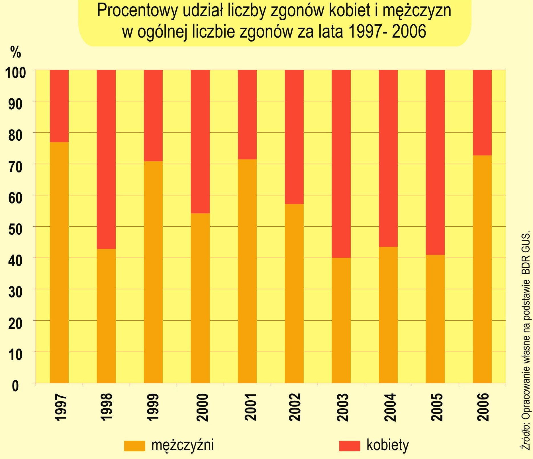 Zgony - płeć-swiatniki gorne